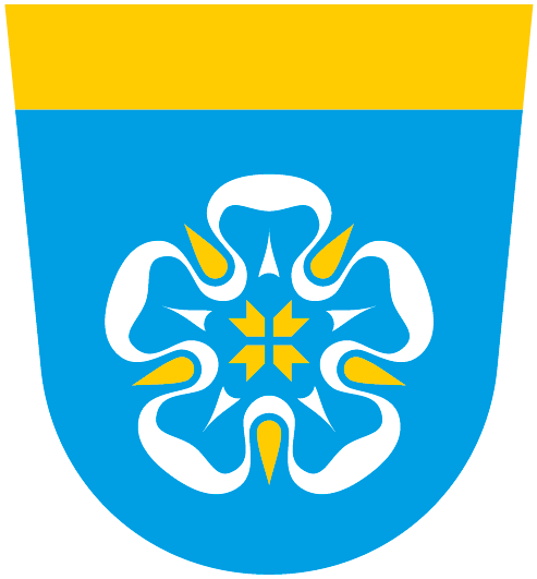 Viljandi valla vapp